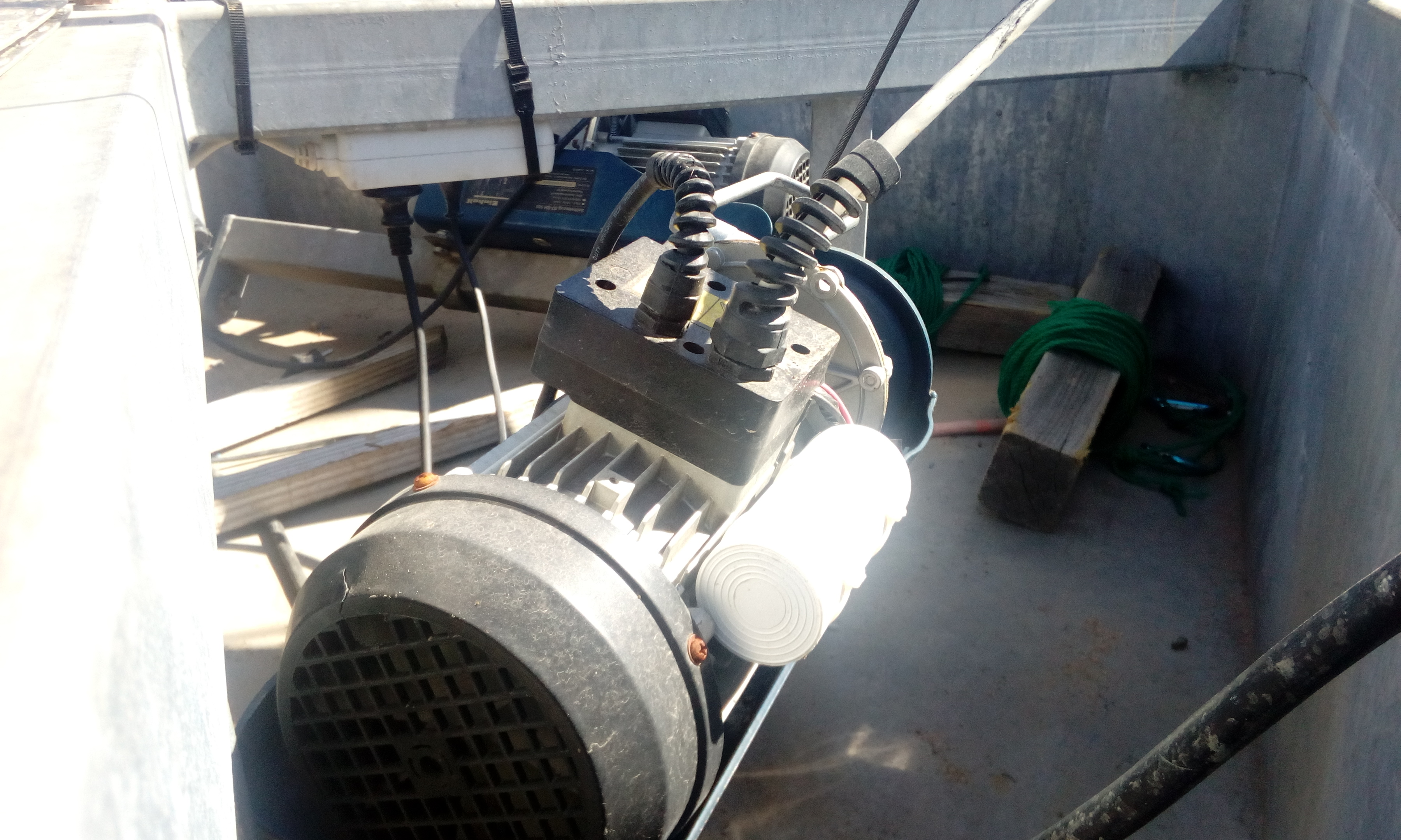 palan électrique équipé d'un moteur diphasé relié en monophasé avec son double condensateur (deux sens de rotation) en blanc